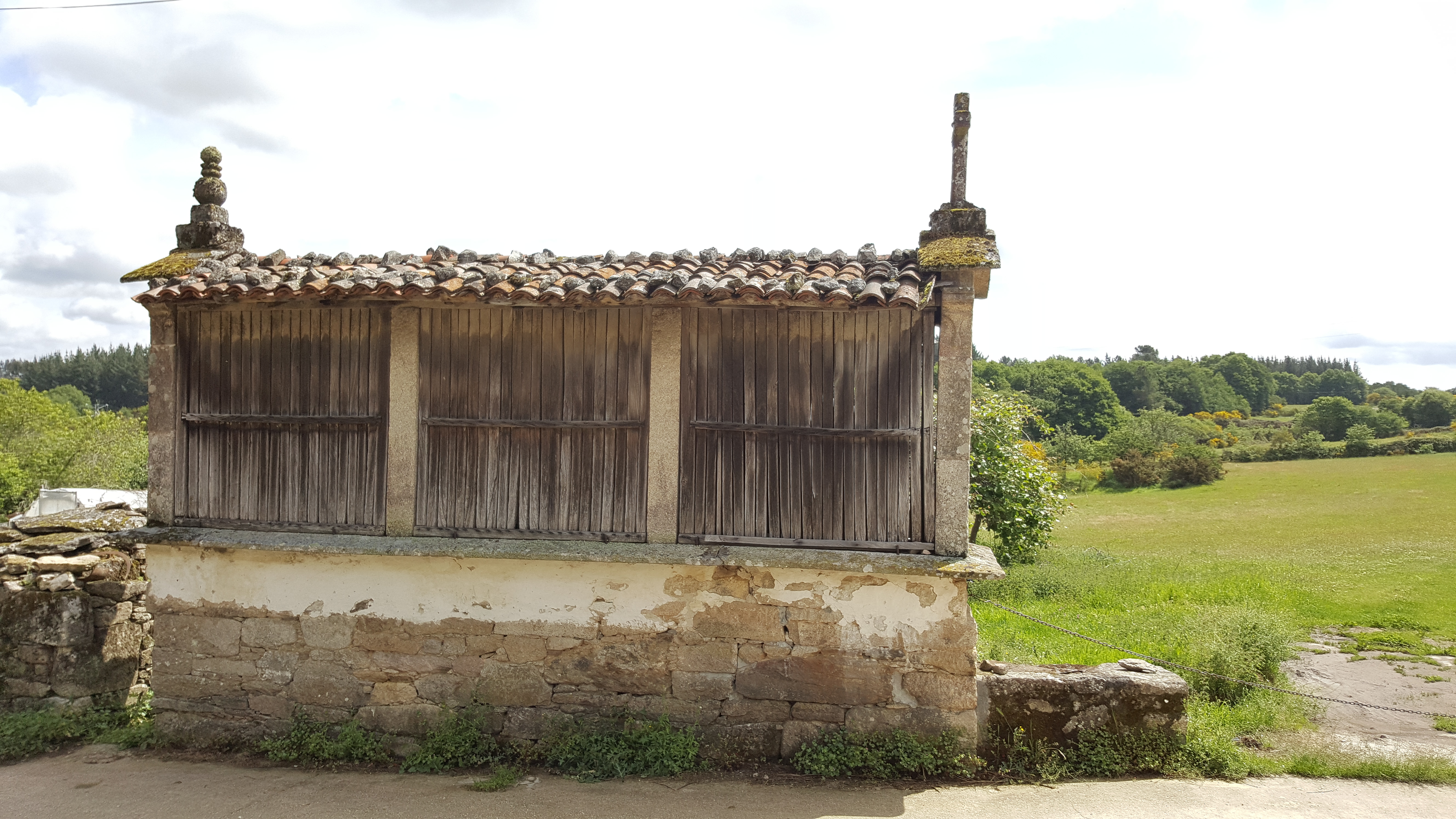 Hórreo de tres claros en A Cervela (Antas de Ulla)